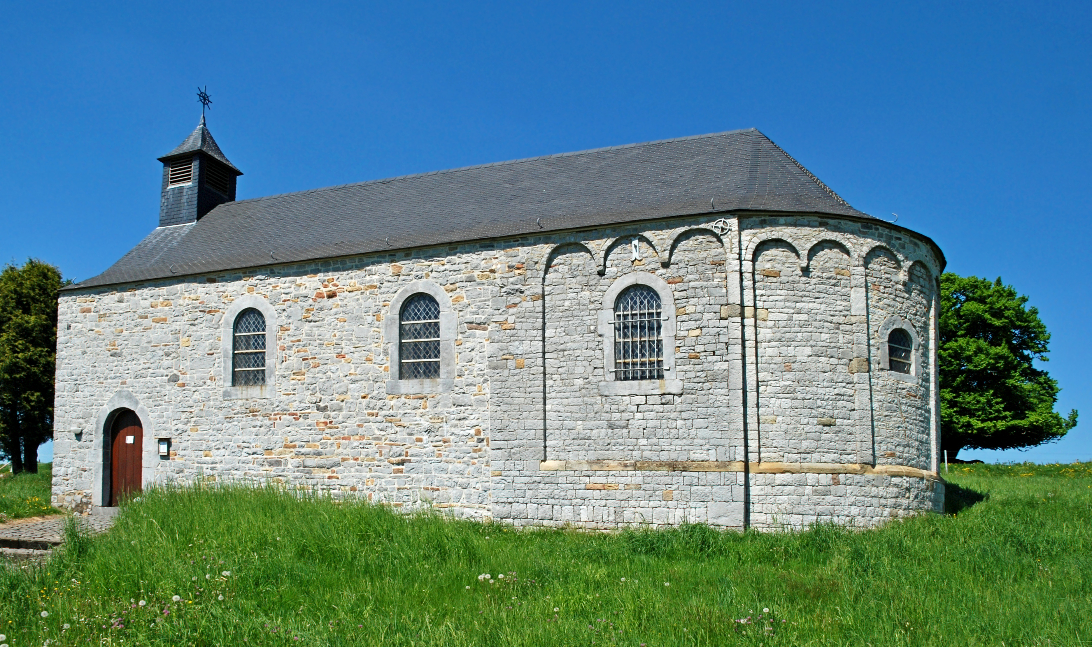 Belgique - Wallonie - Chapelle Saint-Pierre de Limet